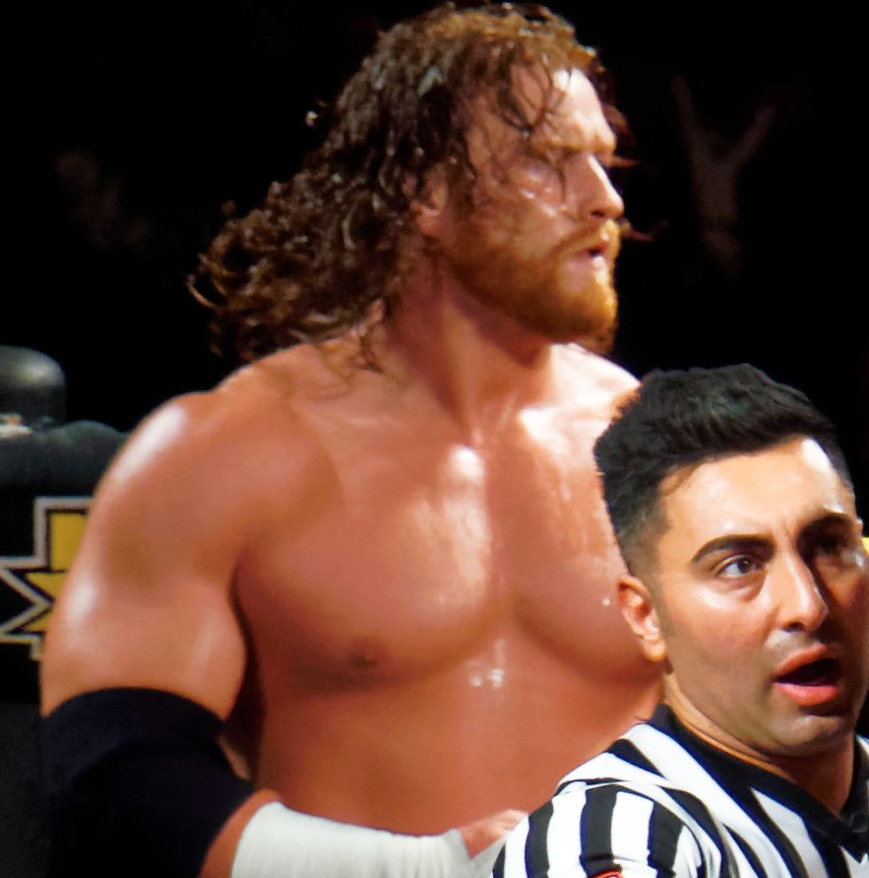 2015-03-27_23-53-08_ILCE-6000_3690_DxO